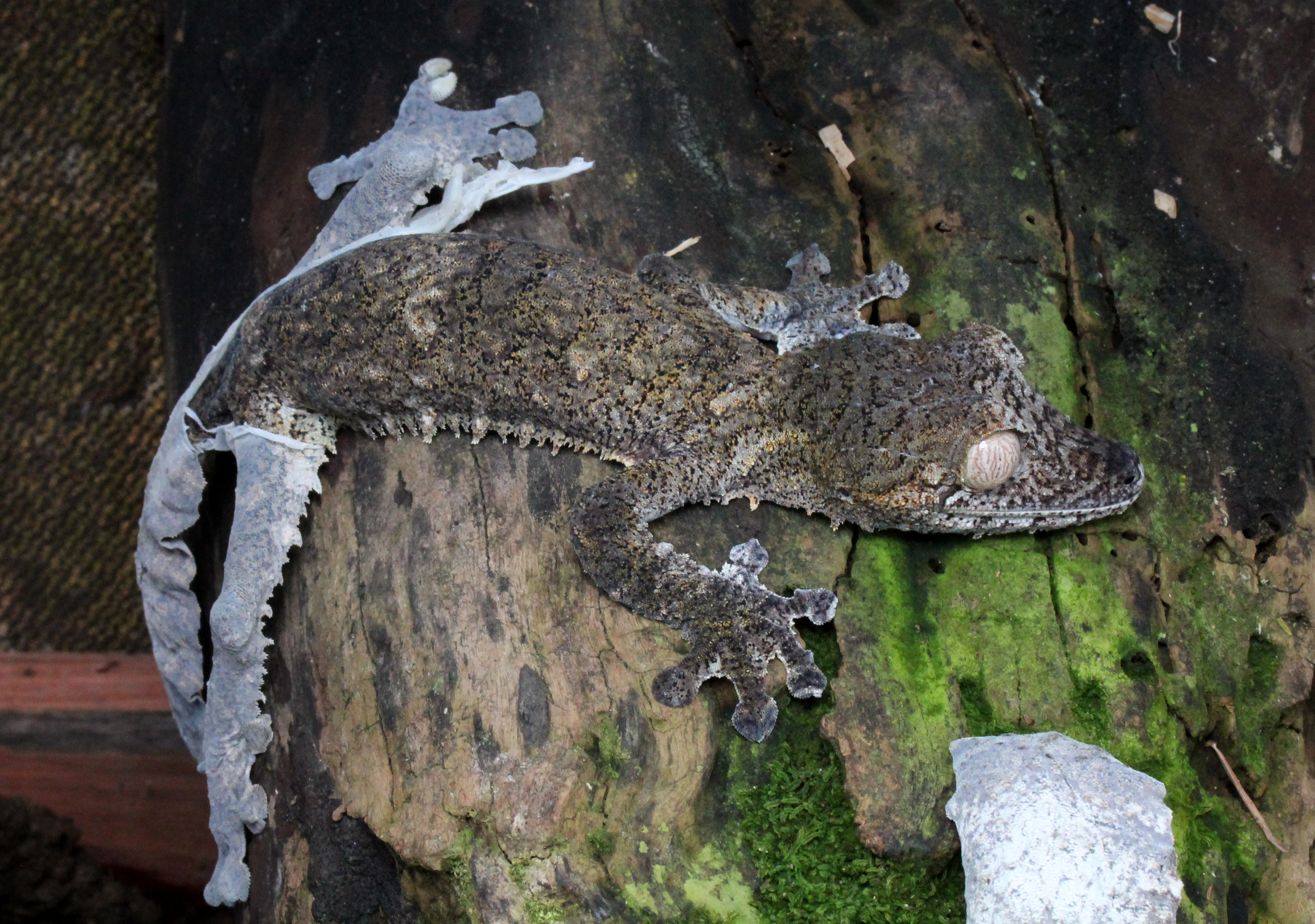 Uroplatus fimbriatus in Peyrieras reptile reserve